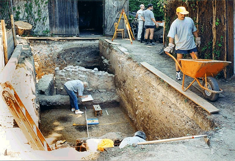 Ausgrabungen innerhalb des Kastell Ala Nova im Jahre 2000, Österreich.